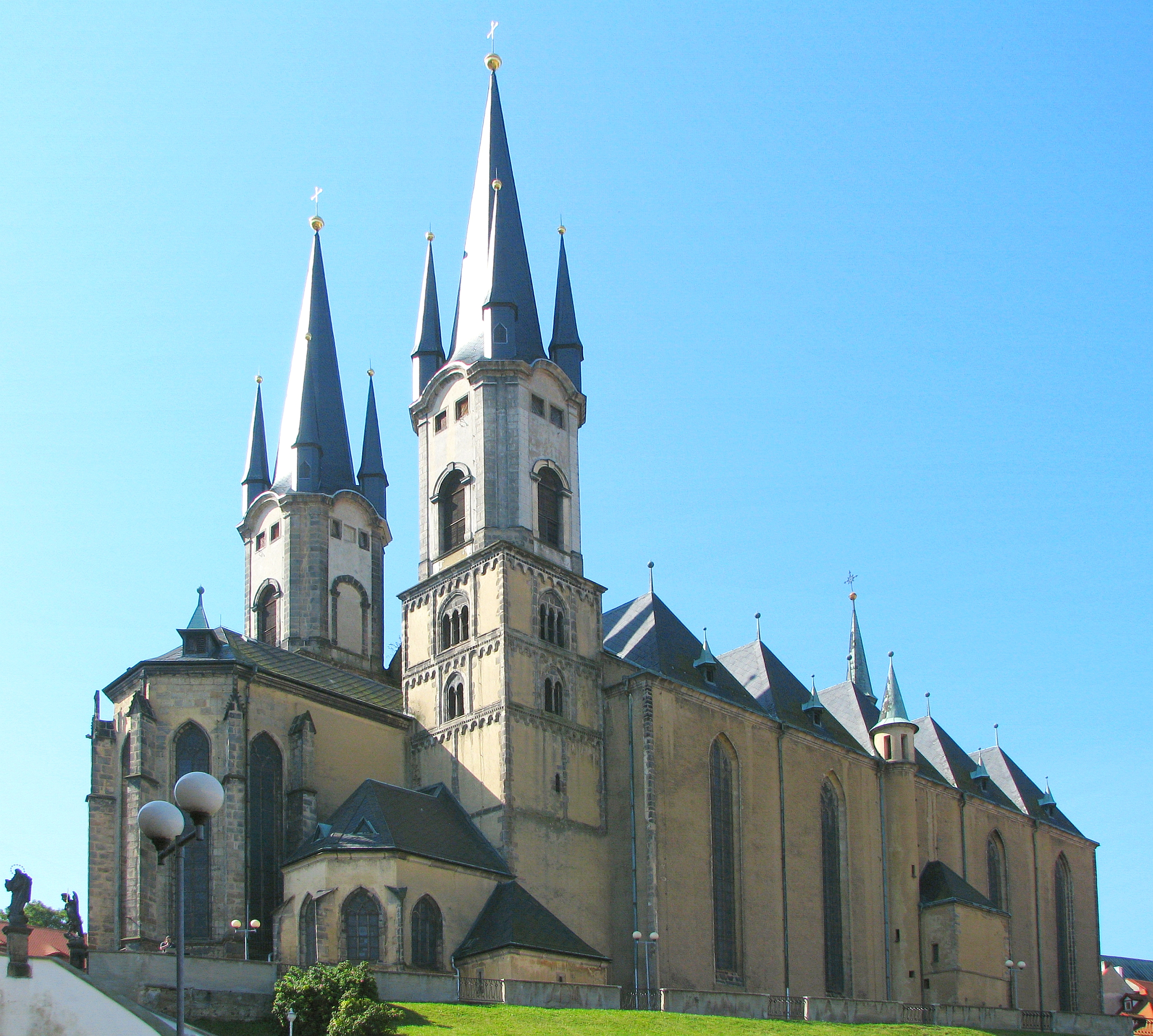 Romanische Basilika St. Nikolaus und Elisabeth in Cheb, zurückgehend auf das 13. Jahrhundert - Bazilika Chrám sv. Mikuláše a Alžbety v Chebu, Česká republika - Tschechien - Foto Wolfgang Pehlemann IMG_1369